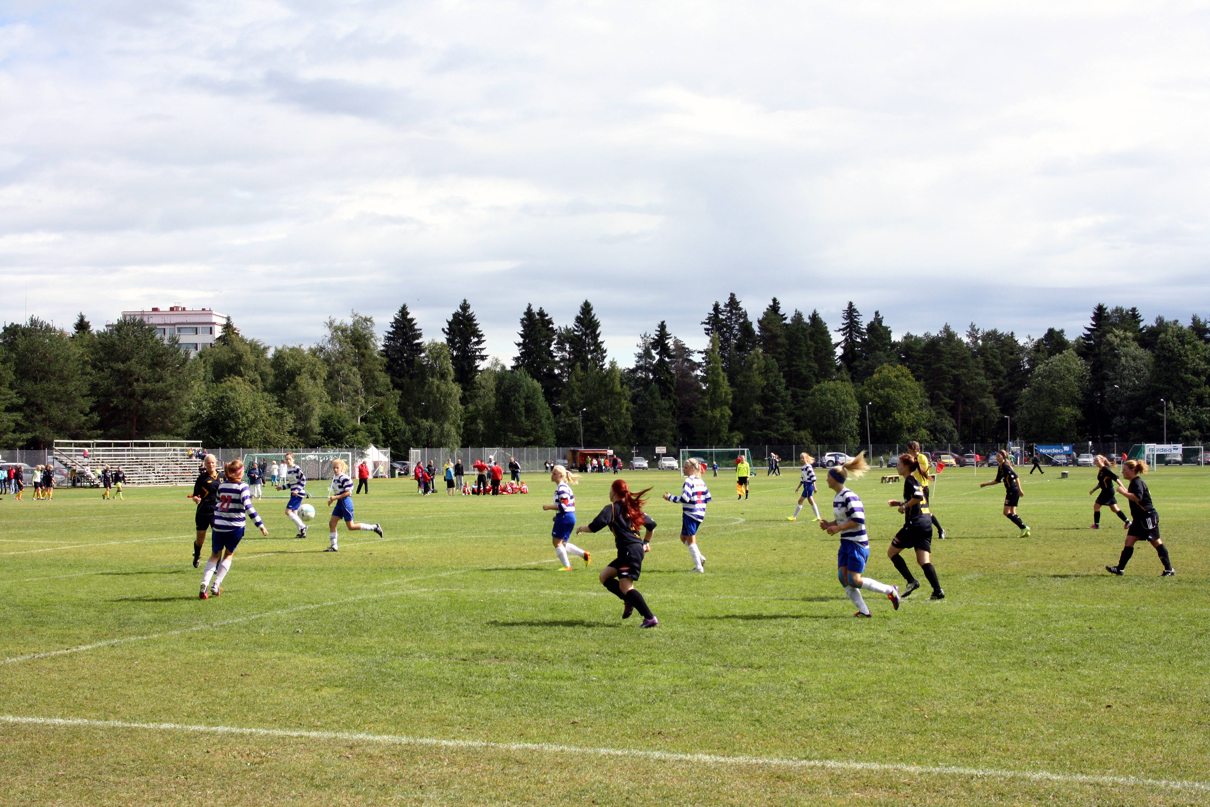 Kokkola Cupin C-15-tyttöjen pronssiottelu SalPa – FC Komu.